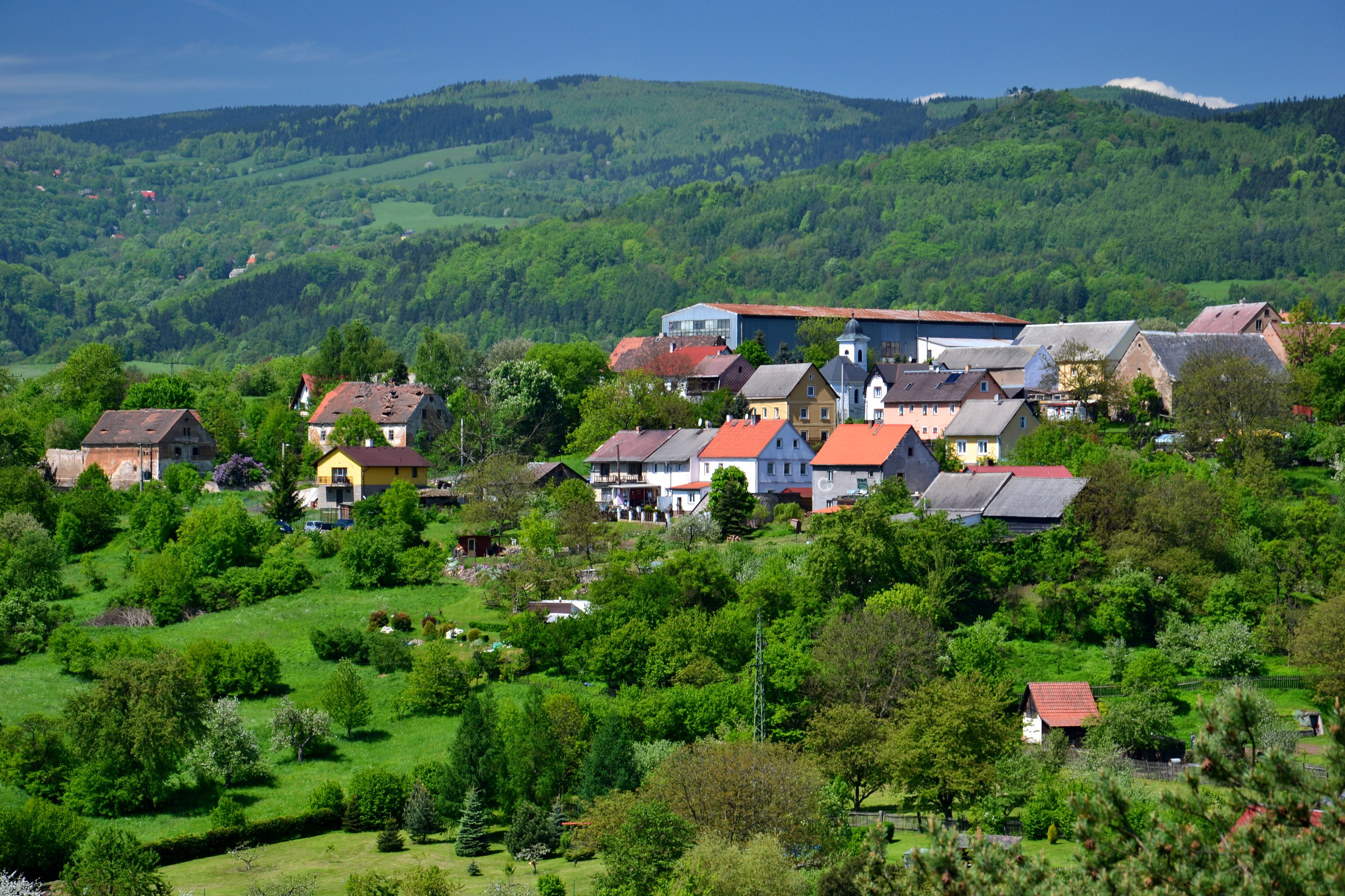 Černýš - celkový pohled na vesnici